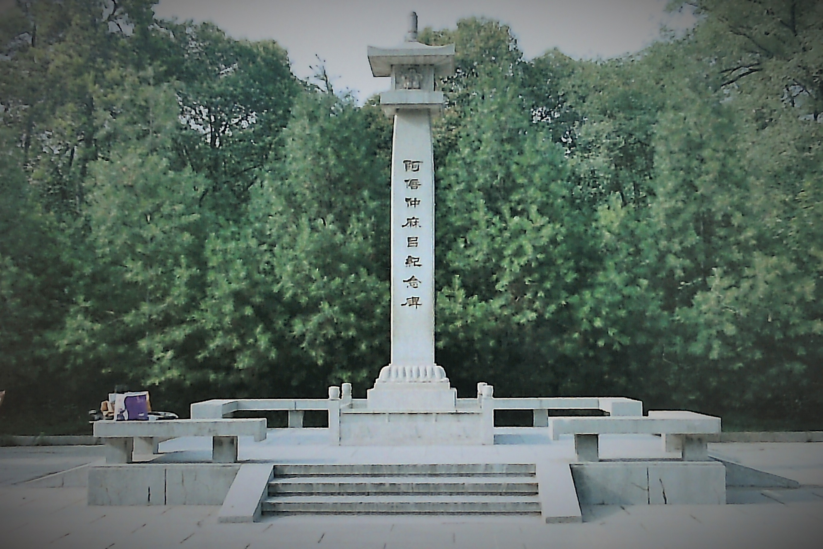 中国・西安市の興慶宮公園に建つ阿倍仲麻呂の記念碑